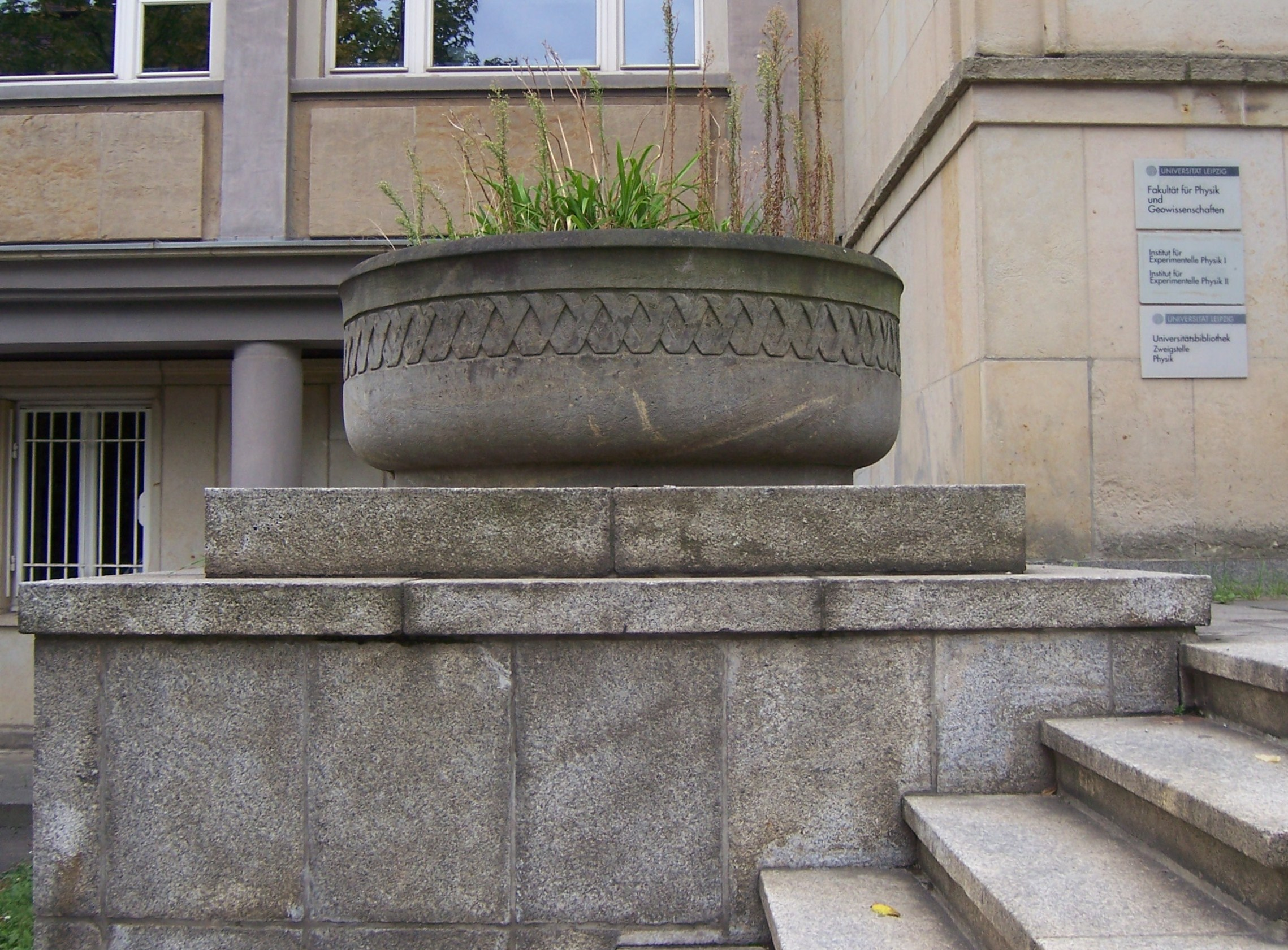 Bruno Eyermann: Steinschale am Eingang des Physikalischen Instituts der Universität Leipzig, 1957